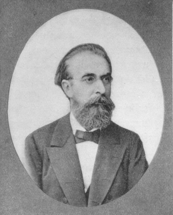 Porträt von Dionys Pruckner, vor 1896.